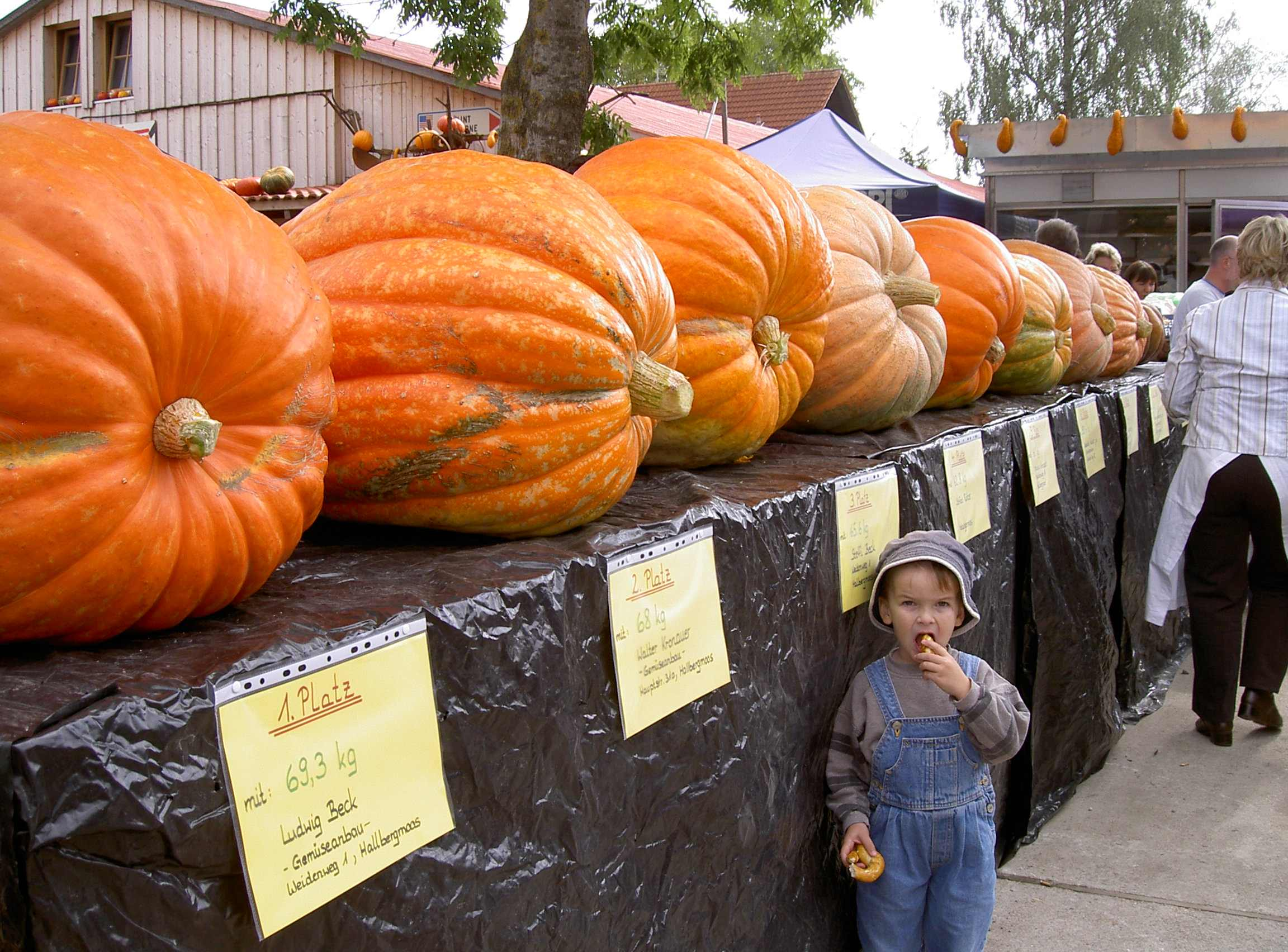 Kürbisse